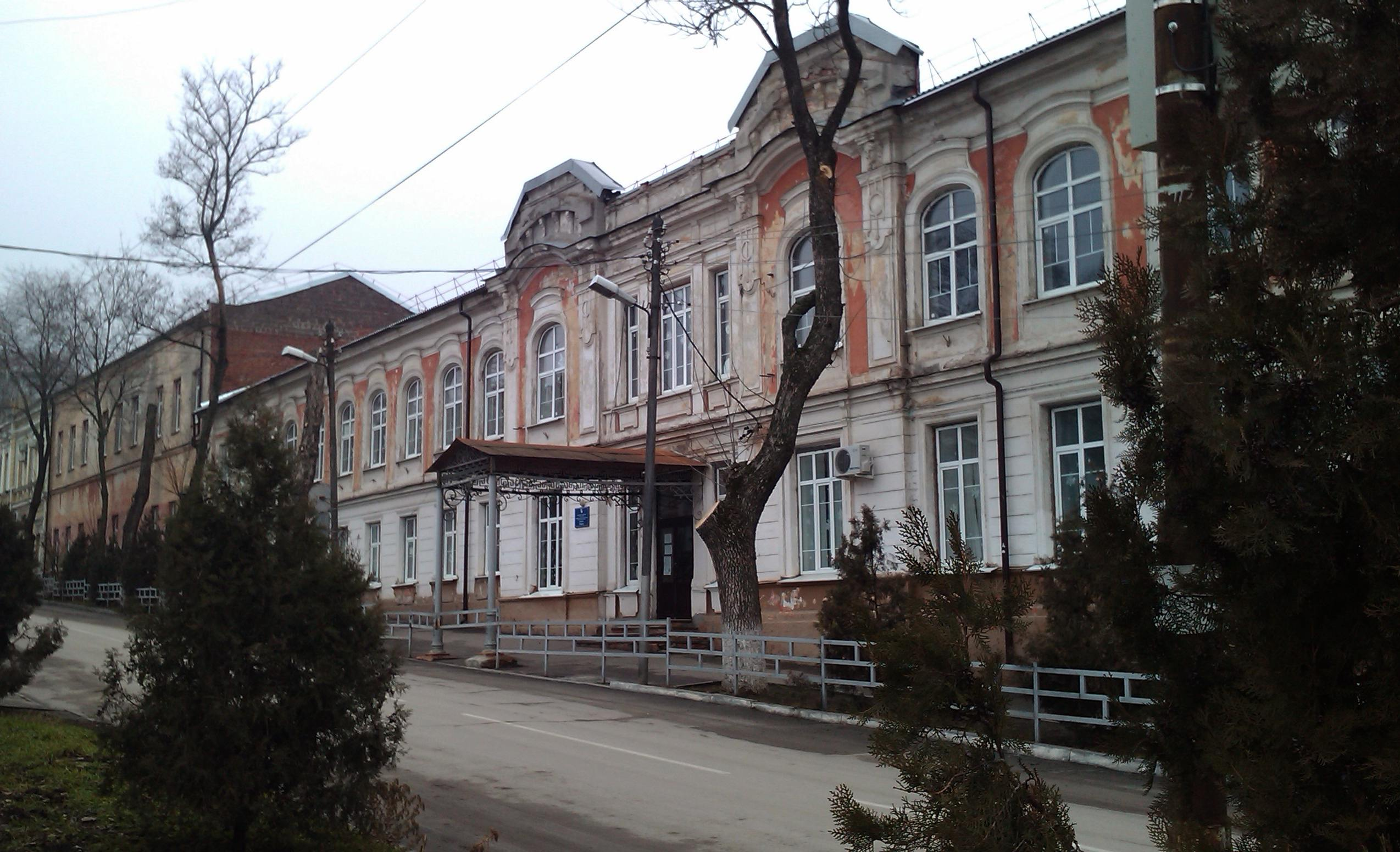 Таганрогский лицей № 4. Таганрог, пер. Лермонтовский, 2.